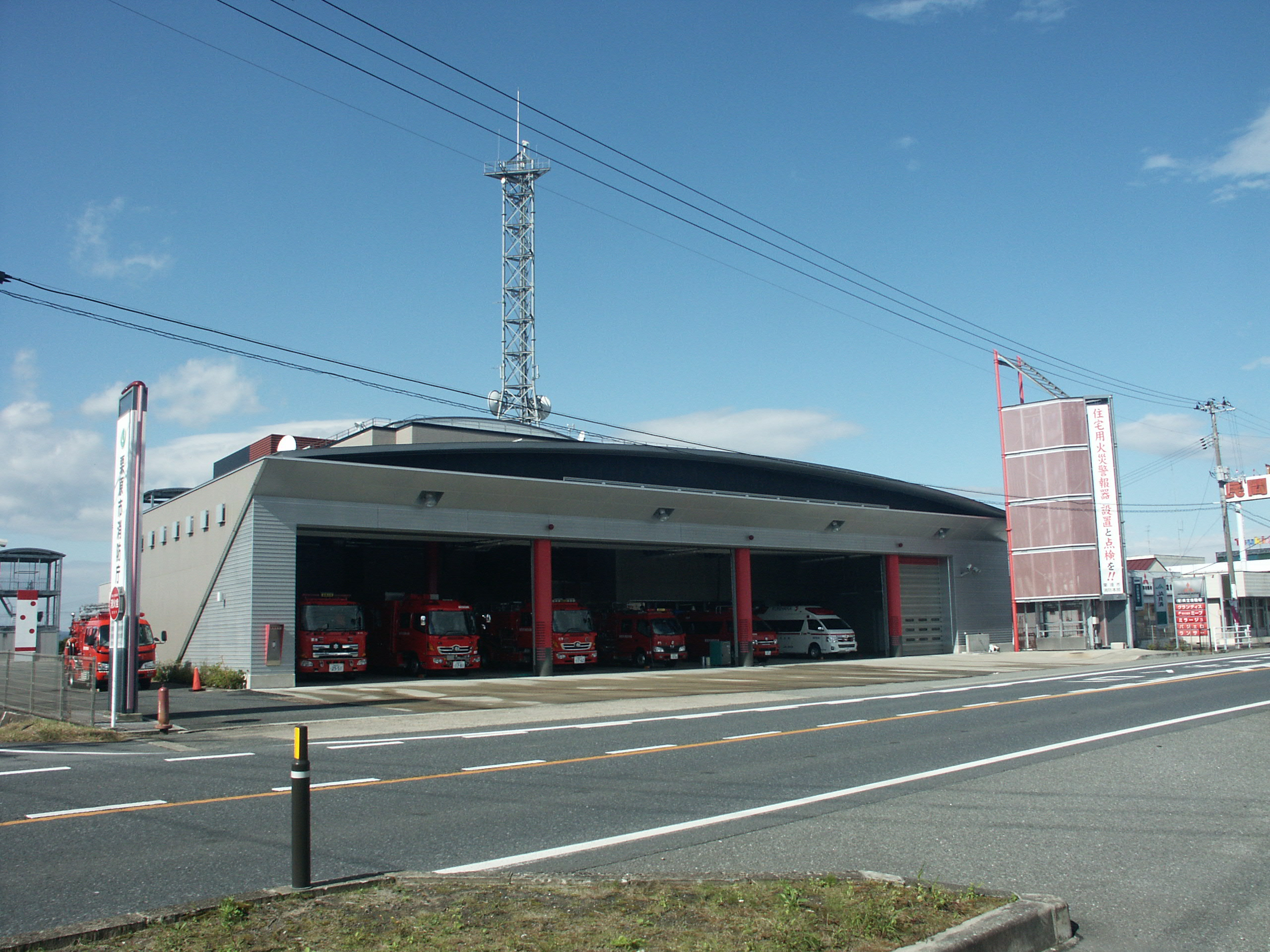 栗原市消防本部栗原消防署